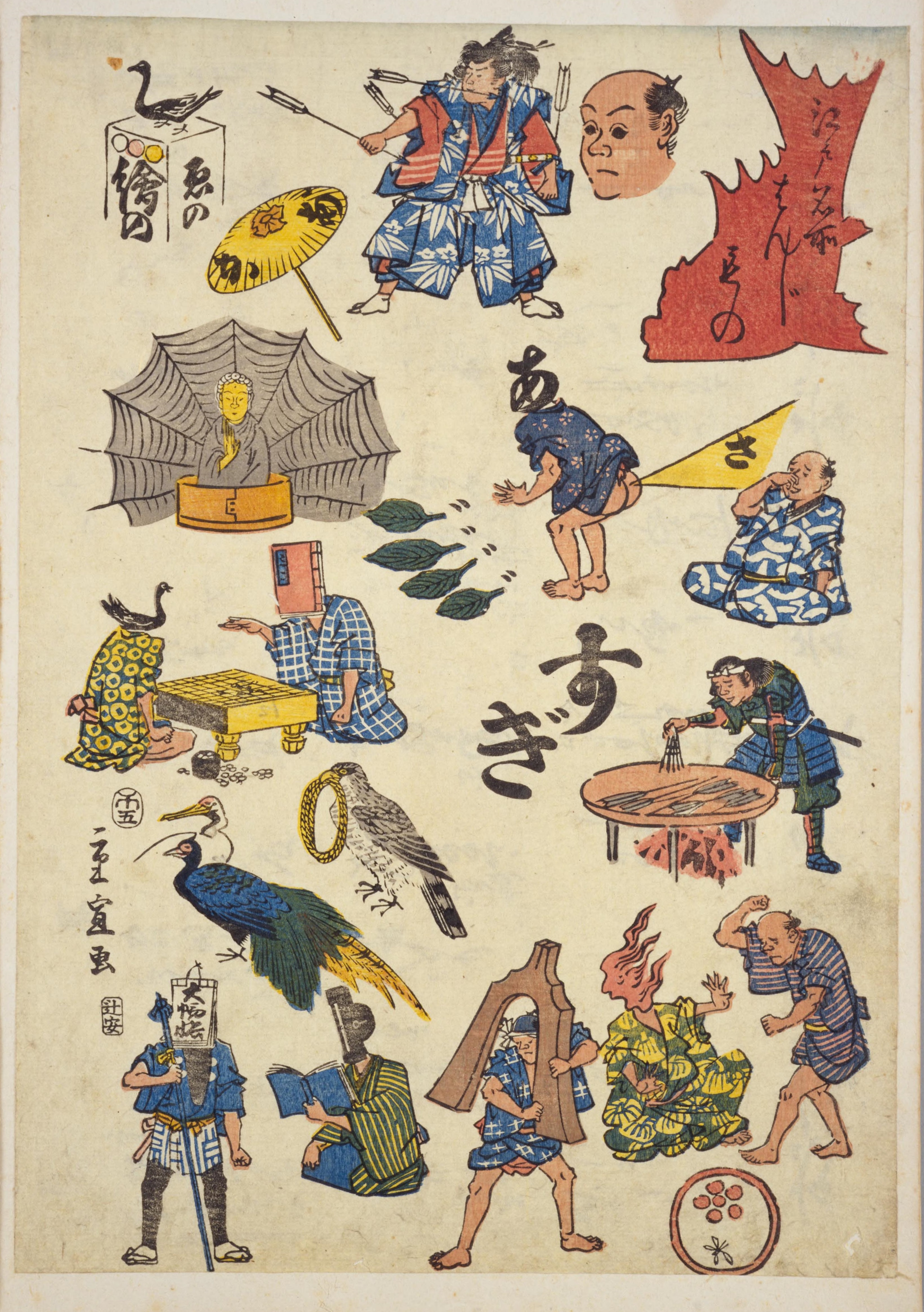 歌川重宣（ｊａ:歌川広重 (2代目)「江戸名所はんじもの